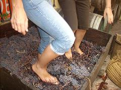 Pisada tradicional de uvas. Museo del Vino de Ronda